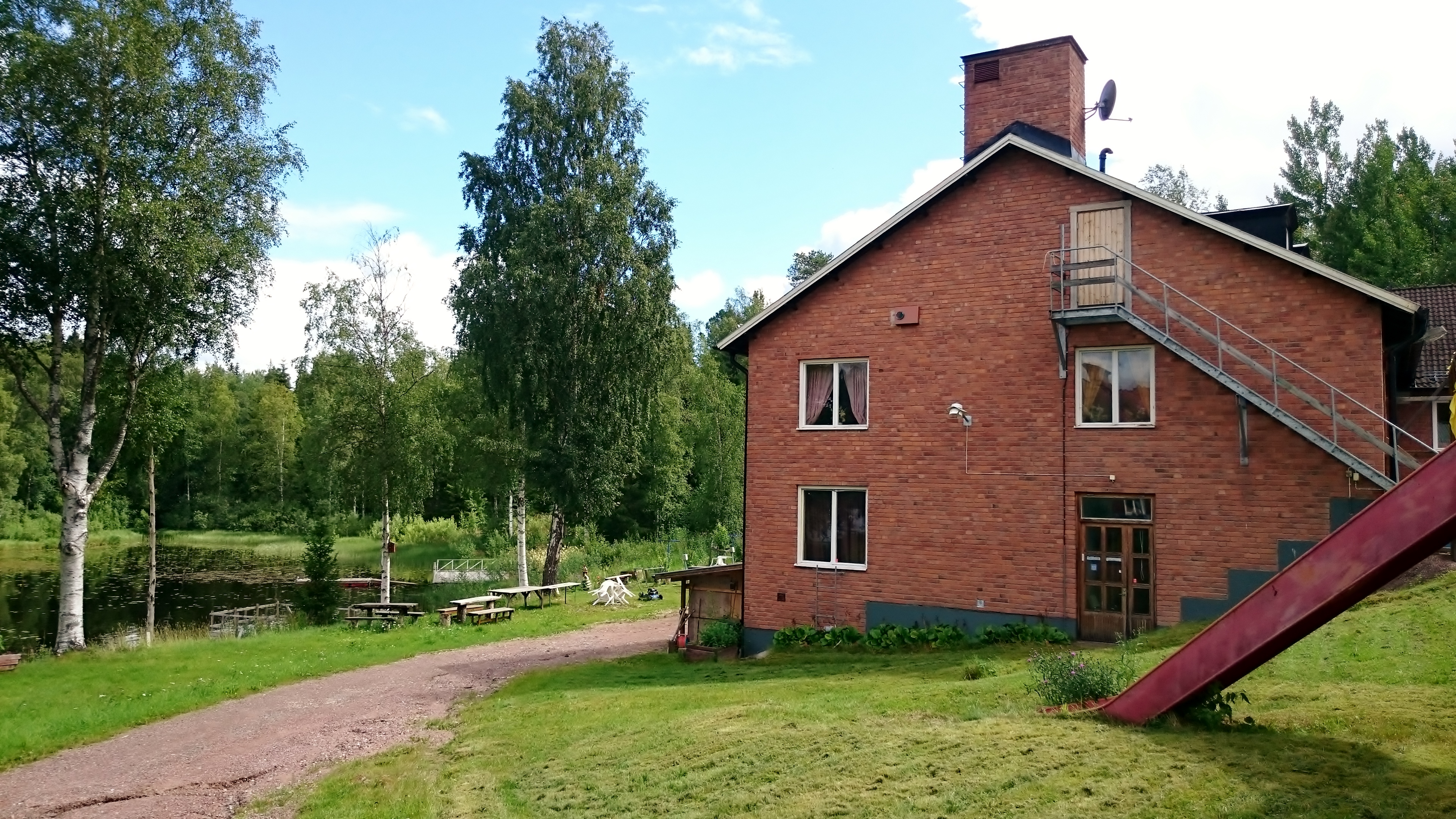 Buddhistiskt tempel i Ulvshyttan, Dalarna